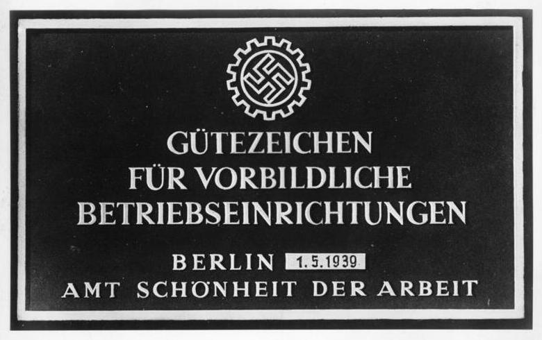 Das neue Gütezeichen für vorbildliche Betriebseinrichtungen. Das Amt Schönheit der Arbeit der DAF hat für vorbildliche Betriebseinrichtungen dieses Gütezeichen geschaffen. Es wird Betrieben verliehen, deren Einrichtungen einerseits einen wirklichen Gesundheitsschutz gewährleisten, andererseits aber auch technisch und nationalwirtschaftlich zweckmäßig sind. Presseamt der DAF/Scherl Bilderdienst 6.3.1939 [Herausgabedatum] AV 54 245